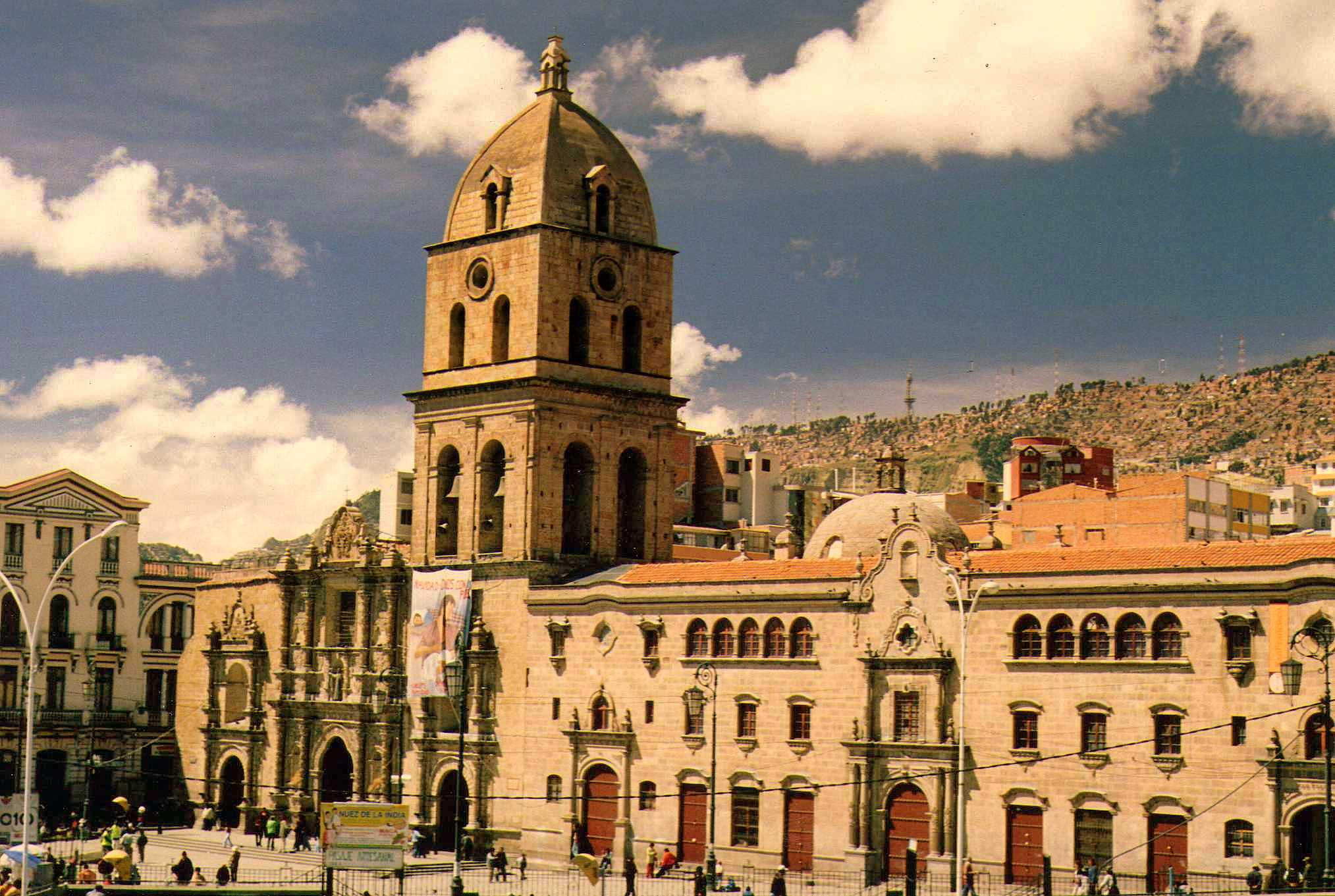 Iglesia San Francisco, La Paz, Bolivia